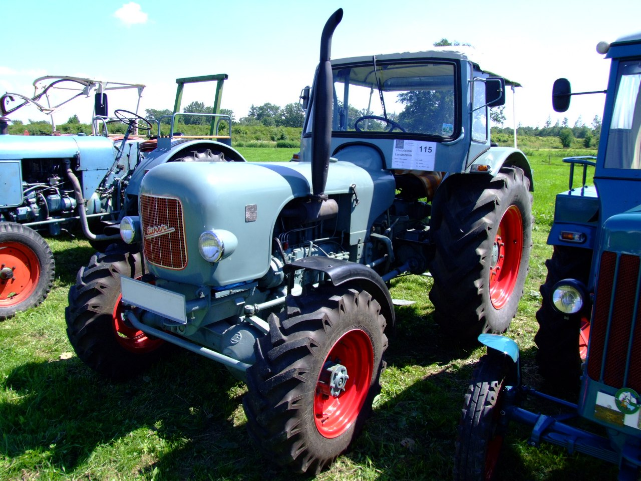 Eicher EA 600 Mammut II A mit 60 PS, Baujahr 1964.